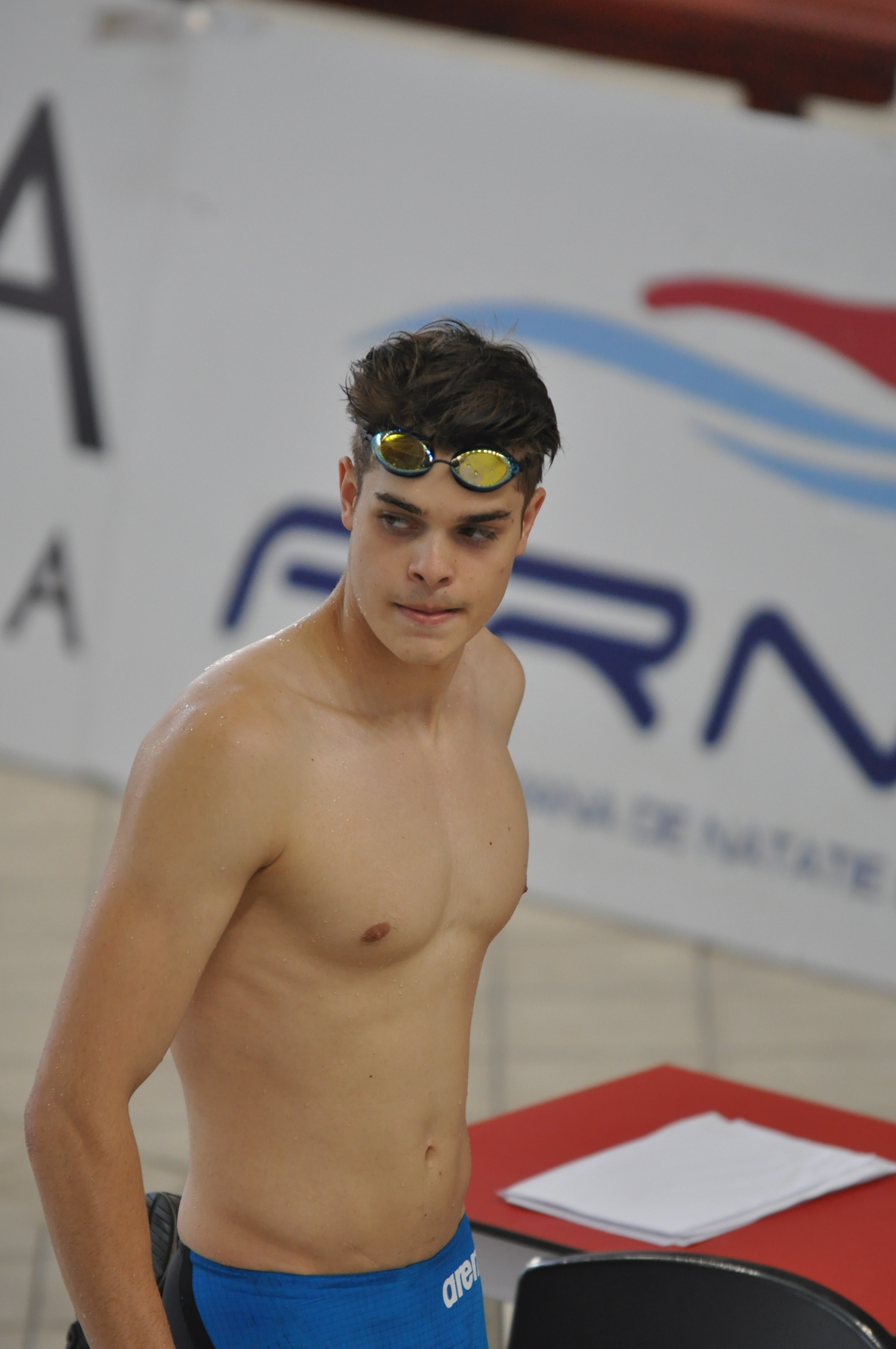 Robert Glință, la Internaționalele României, iulie, 2015